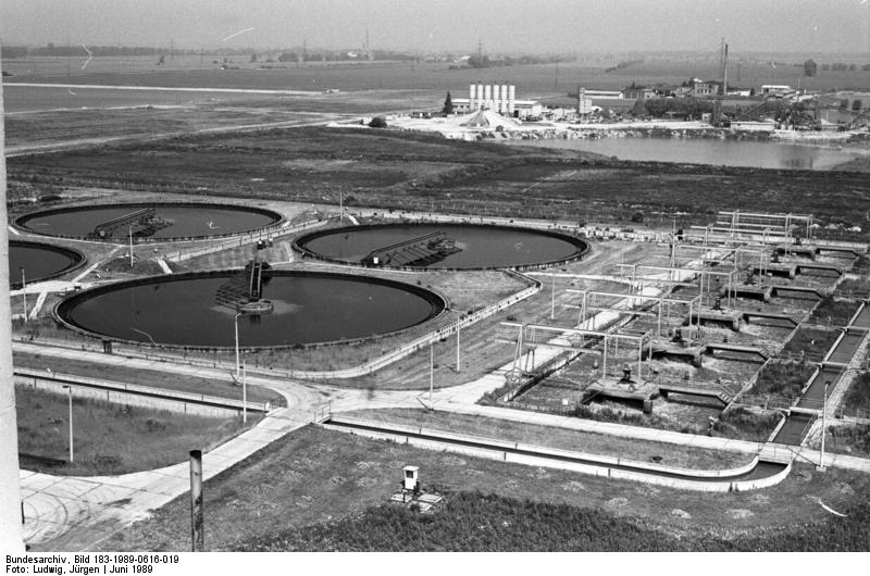 Erfurt, Kläranlagen ADN-ZB/Ludwig 16.6.89 Bez.Erfurt: Kläranlage Sauberes Wasser für die Bezirksstadt Erfurt liefert eine der modernsten und leistungsfähigen Kläranlagen der DDR, die Kläranlage Kühnhausen. Täglich werden hier bis zu 95.000 Kubikmeter Abwässer aufbereitet. Mechanisch und biologisch gereinigt gelangen sie nach Durchströmen der Anlage mit Brauchwasserqualität in das Flüßchen Gera. Gegenwärtig gibt es in der DDR insgesamt mehr als 1.000 Kläranlagen. 5,5 Millionen Kubikmeter Abwässer können täglich dort behandelt werden. Damit stieg die Kapazität der Klärwerke seit 1970 um fast 72 Prozent an.